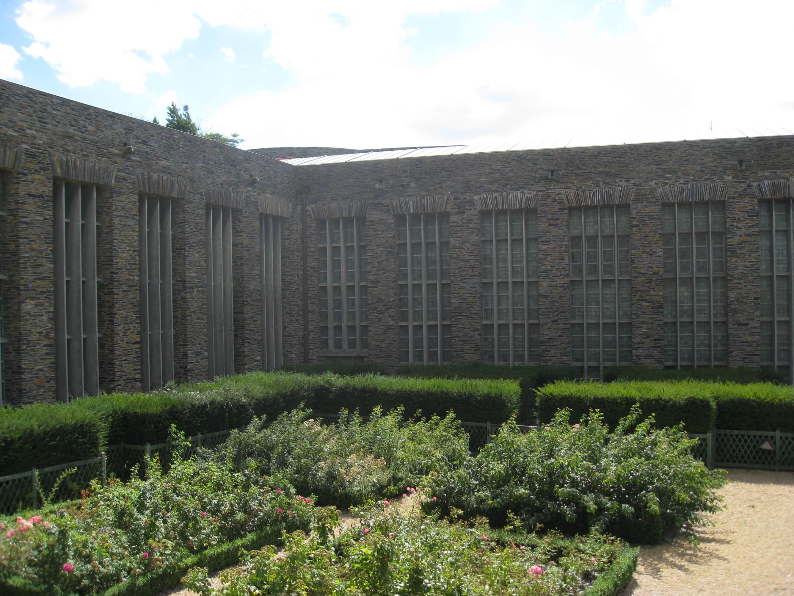 Musée de la Tapisserie de l'Apocalypse